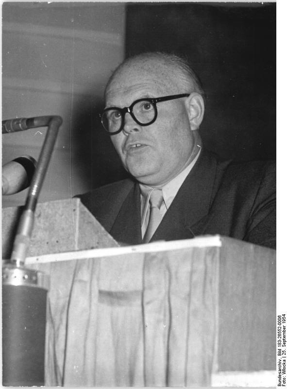 Zentralbild-TBD-Wlocka 2468 Zi-Ho. 8 Motive 25.9.1954 7. Parteitag der CDU in Weimar - 21. bis 25.9.1954 Der 3. Verhandlungstag, Freitag, der 24.9.1954, stand im Zeichen der Aussprachen. UBz: Der Präsident der Industrie- und Handelskammer der DDR, Erich Wächter, bei seinen Ausführungen.